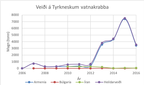 Myndin sýnir veiði á tyrkneskum vatnakrabba síðustu ár eftir mismunandi löndum